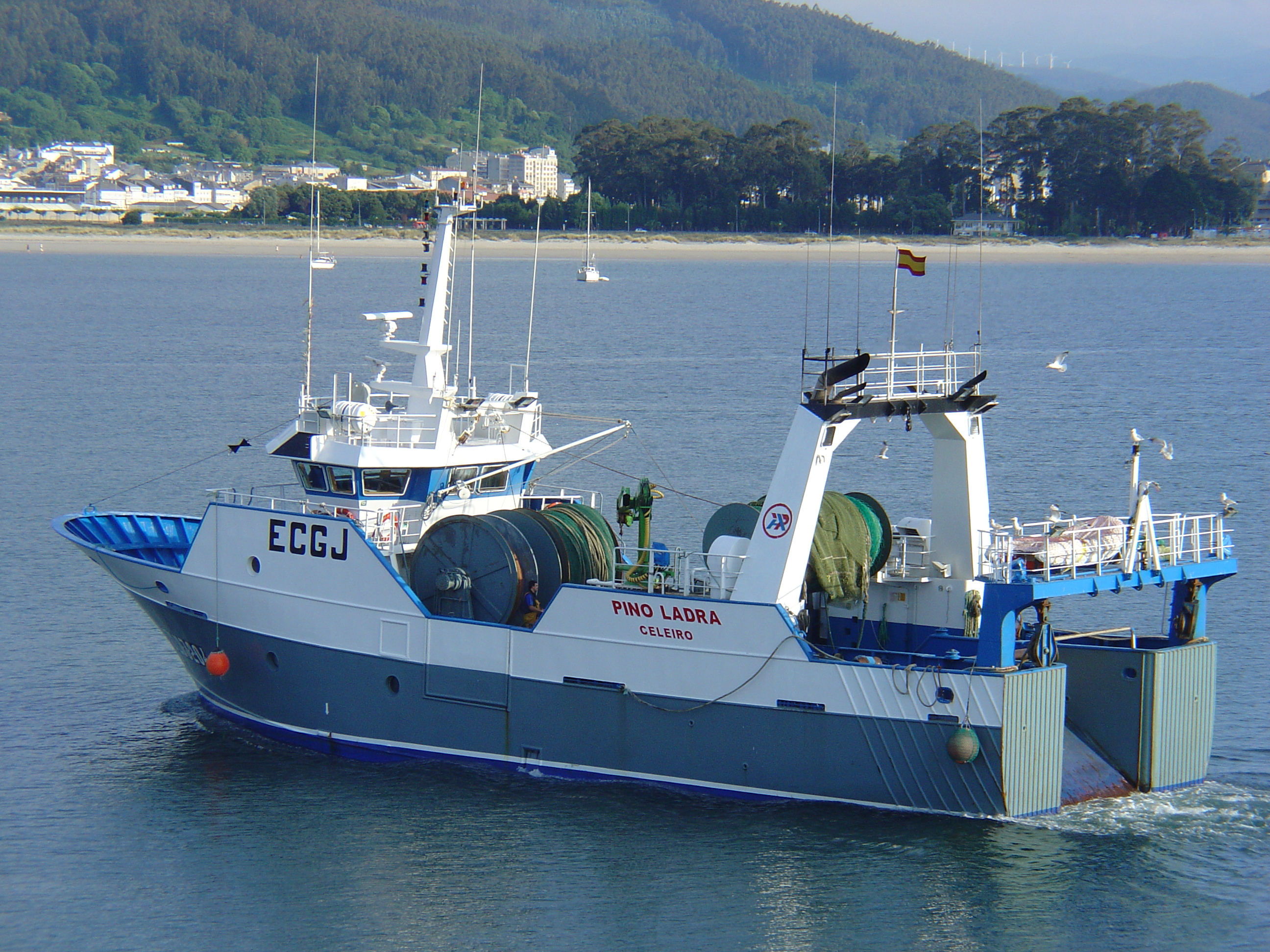 Ficha do Buque Nome do buque Lista Matrícula Folio PINO LADRA 3 LU-3 2-04 RBPCAG 2005LU000396 Estado Alta Porto base Celeiro Caladoiro/Tipo de pesca CALADERO NACIONAL ARRASTRE Artes ARRASTRE DE FONDO Ano construcción 2004 Data entrada en servicio 08/11/2004 Arqueo TRB 171,00 Arqueo GT 277,00 Eslora total 31.40 M. Eslora PP 25.17 M. Potencia 489.00 CV. Material casco Aceiro